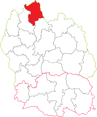 Situation du canton dans le département de la Lozère (France)